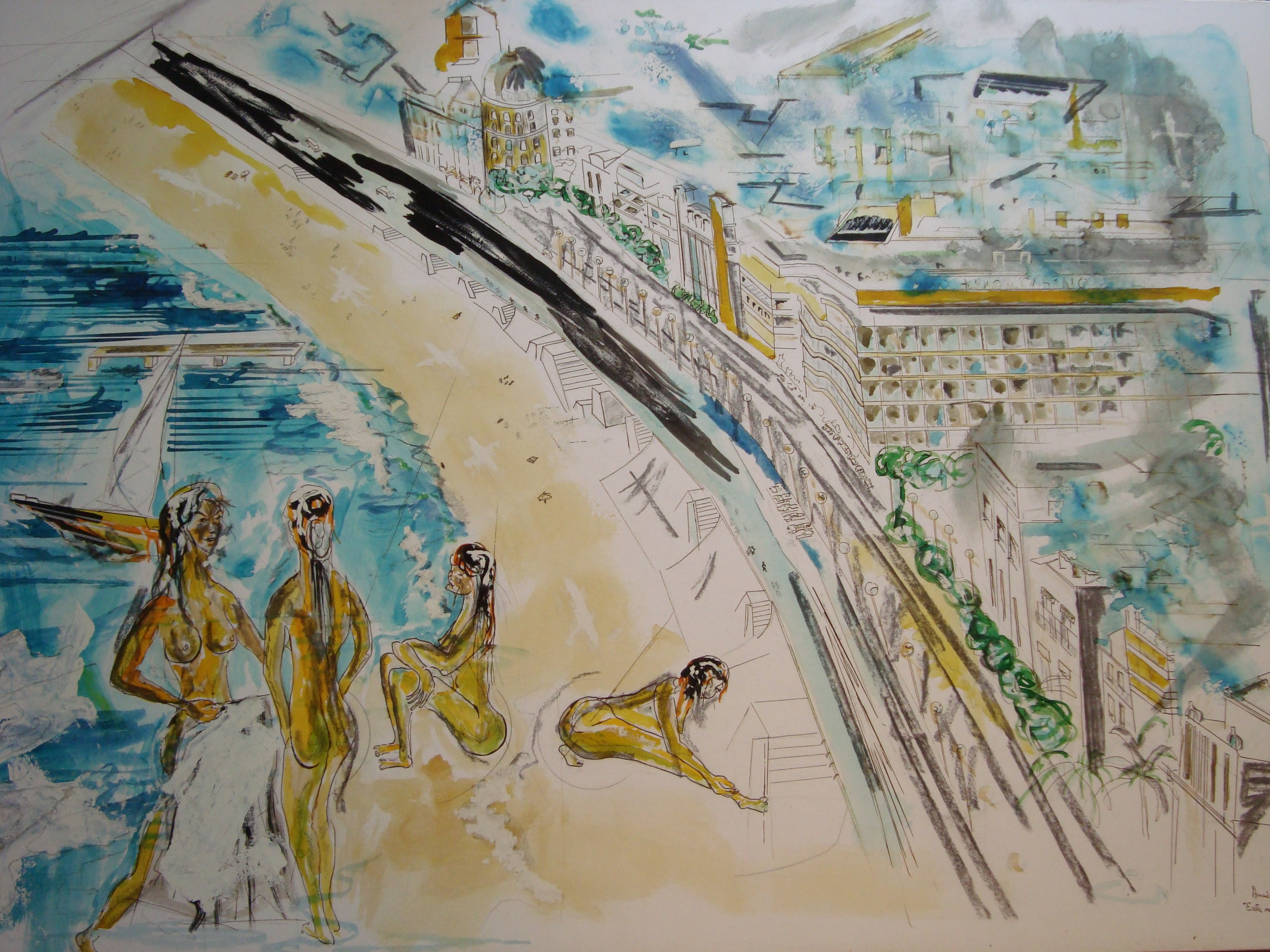 La baie des Anges, par Arnaud Courlet de Vregille (1994, Encre acrylique 80 x 60)